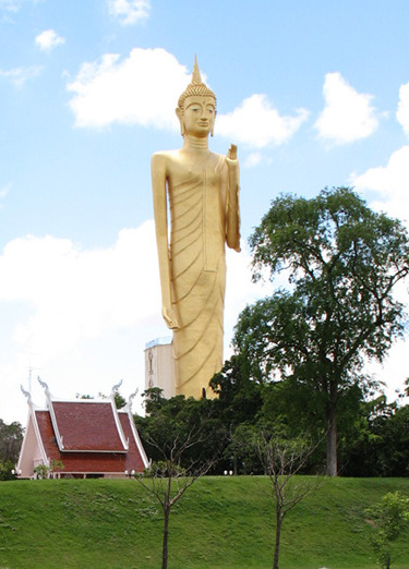 Phra Phuttha Rattana Mongkhon Maha Muni or Luang Pho Yai, Wat Burapha Phiram, Roi Et Province.